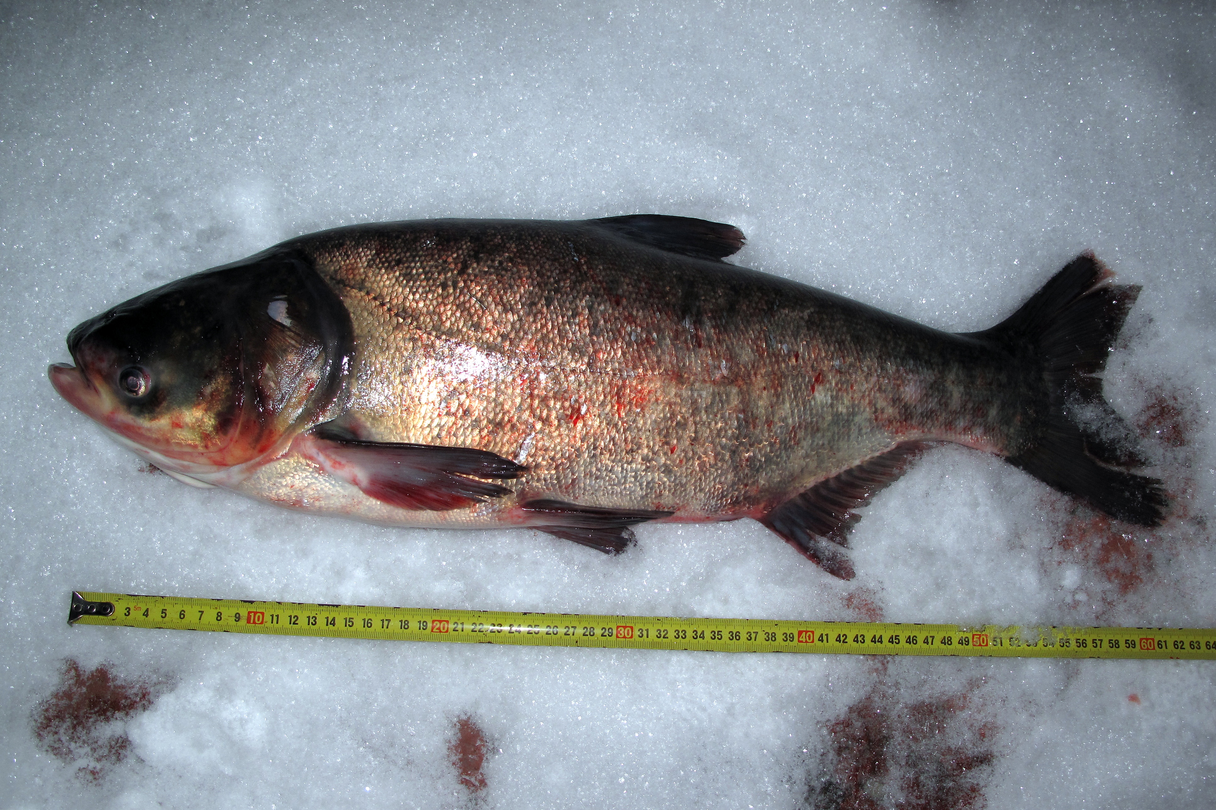 Tolstolobec pestrý, délka 63 cm, váha 3,8 kg, samec